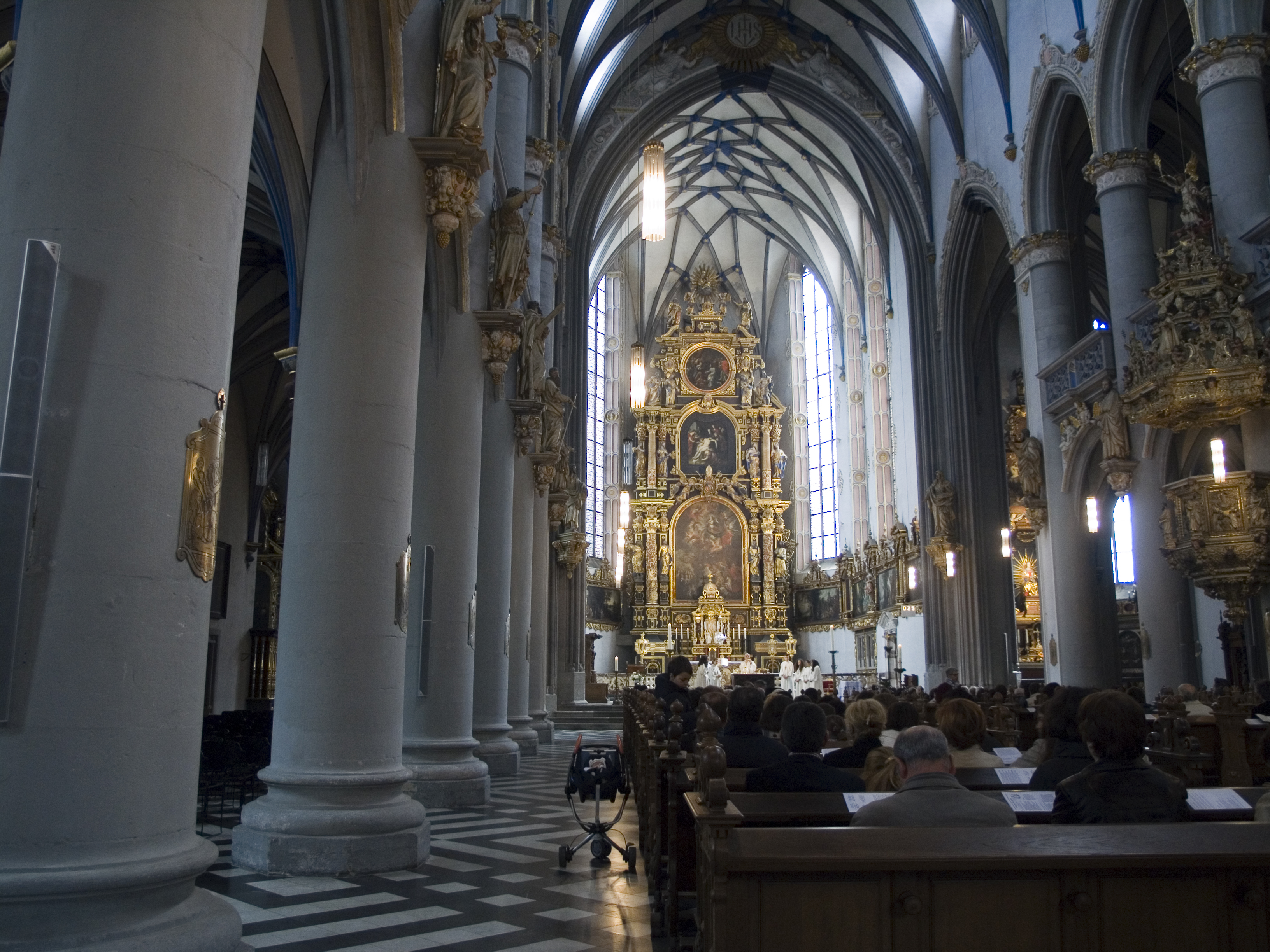 Северный Рейн - Вестфалия, Кёльн - Церковь Успения Пресвятой Богородицы